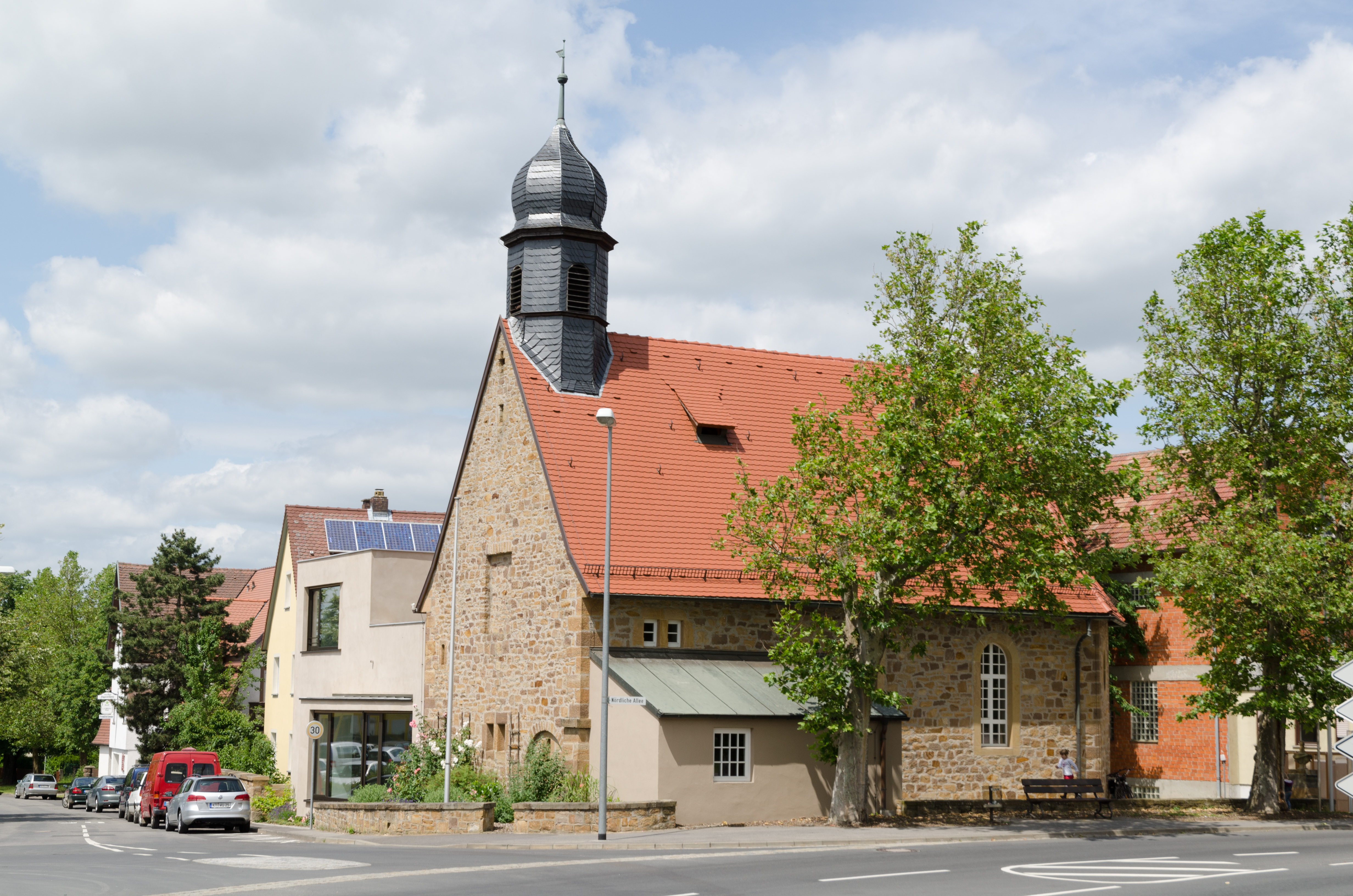 Gerolzhofen, Evang.-Luth. Erlöserkirche